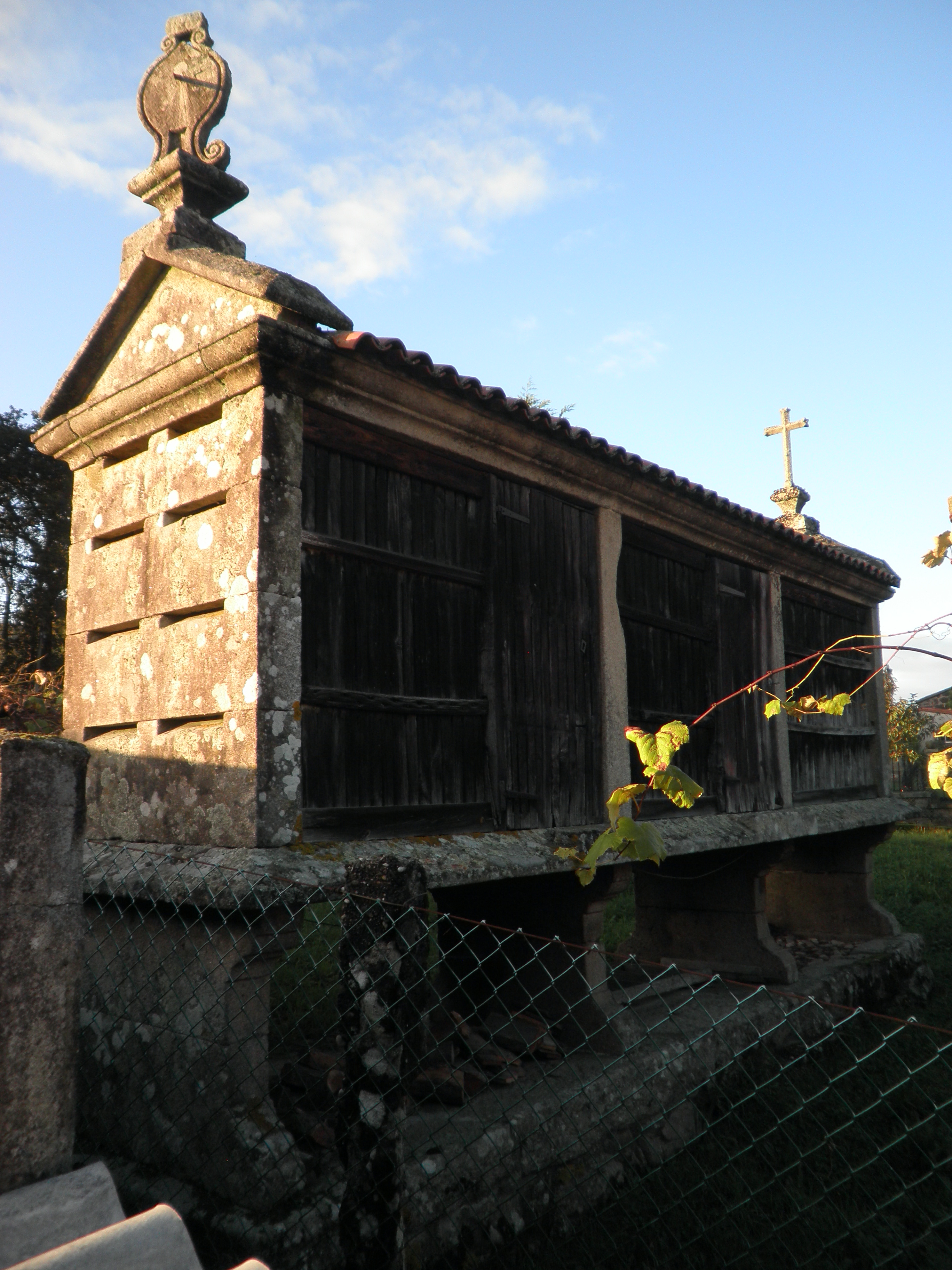 Hórreo na aldea de Vigo con reloxo de Sol, en Dodro.